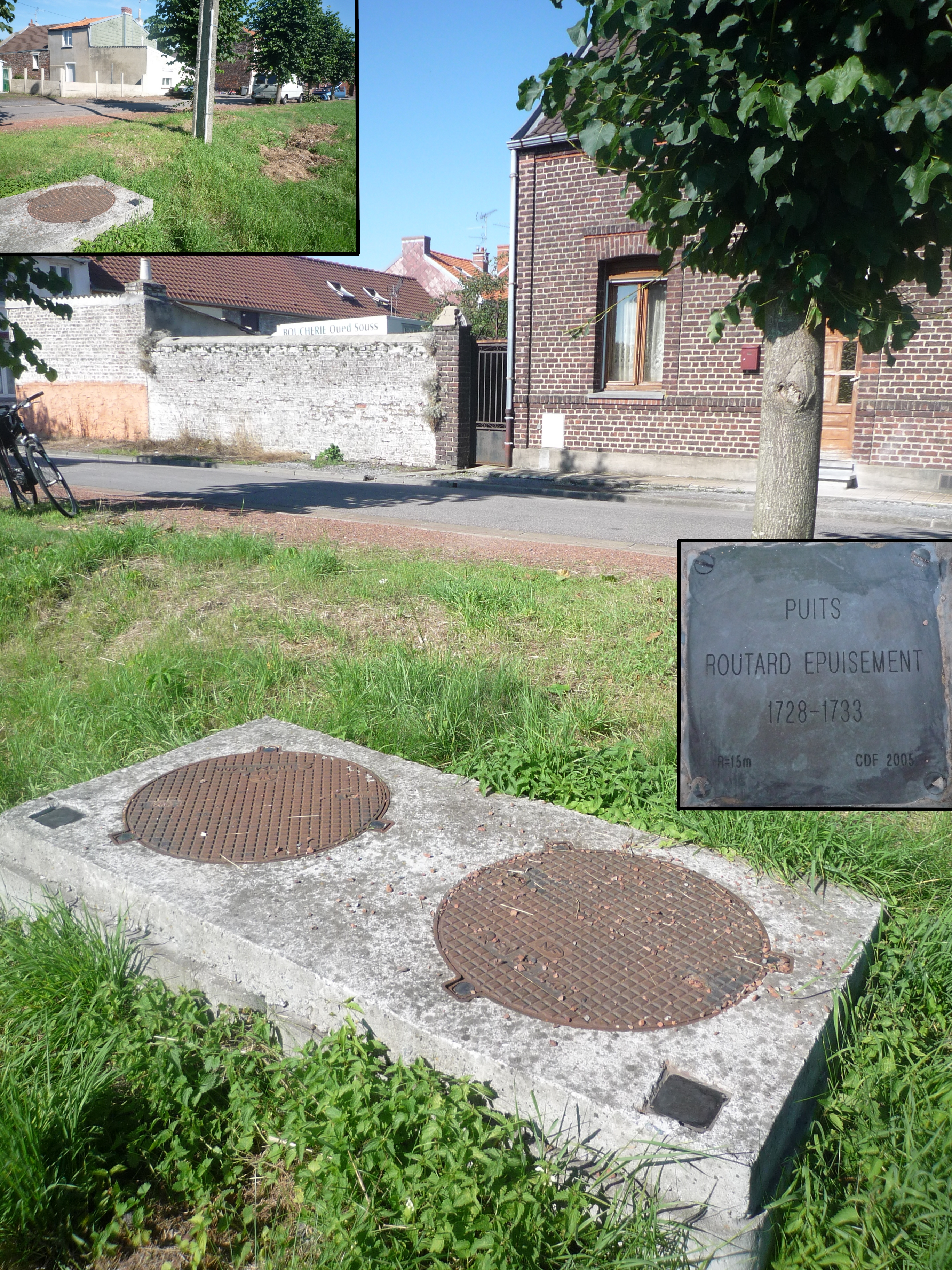 Puits Routard Épuisement de la Compagnie des mines d'Anzin à Fresnes-sur-Escaut, Nord, Nord-Pas-de-Calais, France.